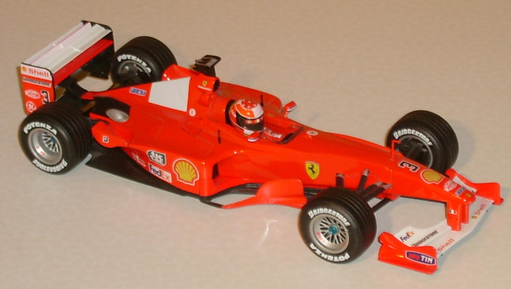 Hot Weels Ferrari F1 von 2000 (Michael Schumacher)